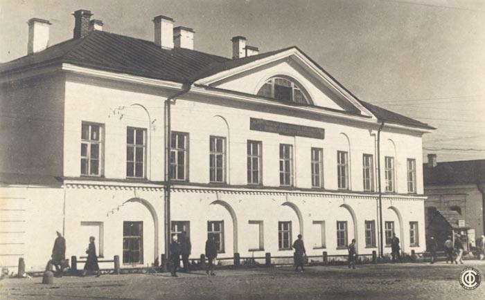 Публичная библиотека Петрозаводска в бывшем доме купца I гильдии Филиппа Бекренёва в Петрозаводске (постр. 1791 г.). Архитектор Федор Крамер. Открытка 1934 года